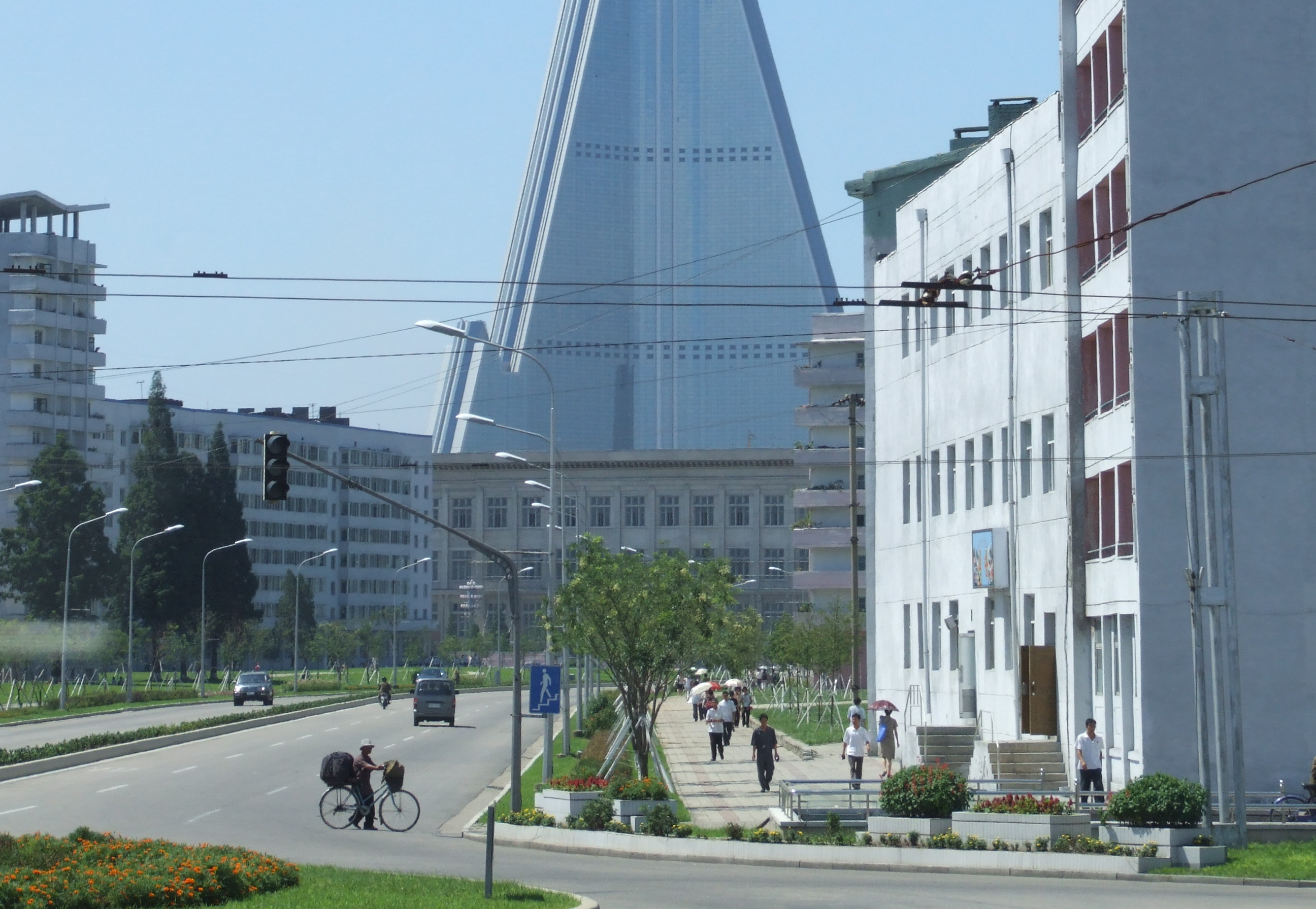 Hyoksin-Straße Ecke Sangsin-Straße